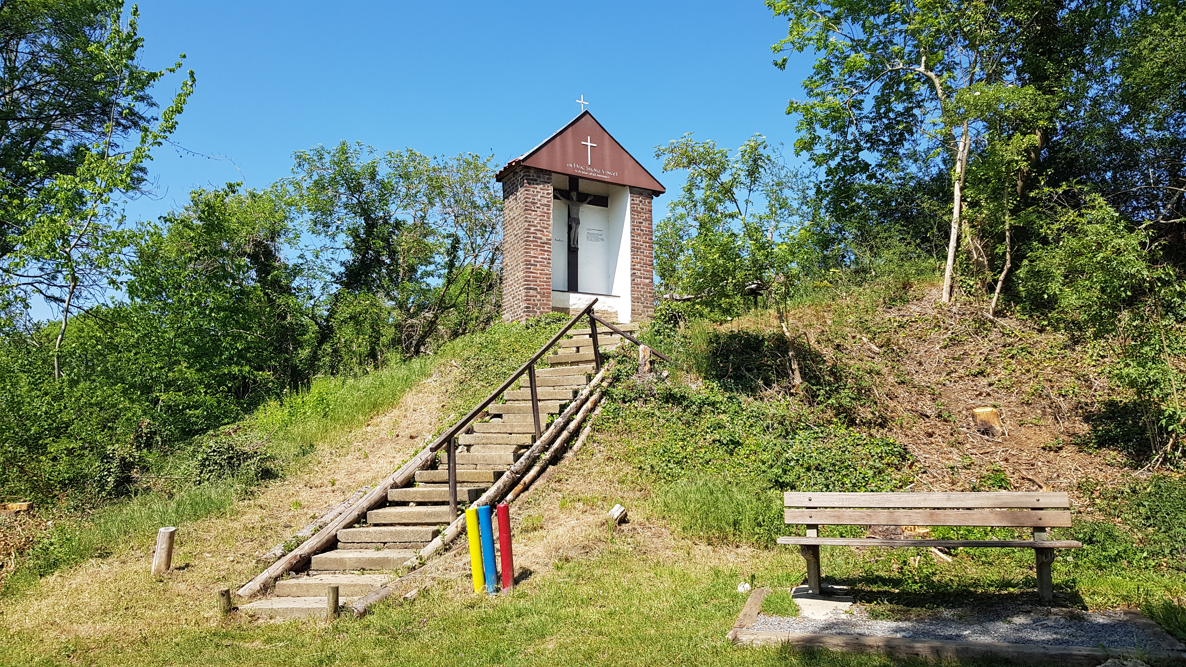 Kapel Trichterbeeldje, 's-Gravenvoeren, België